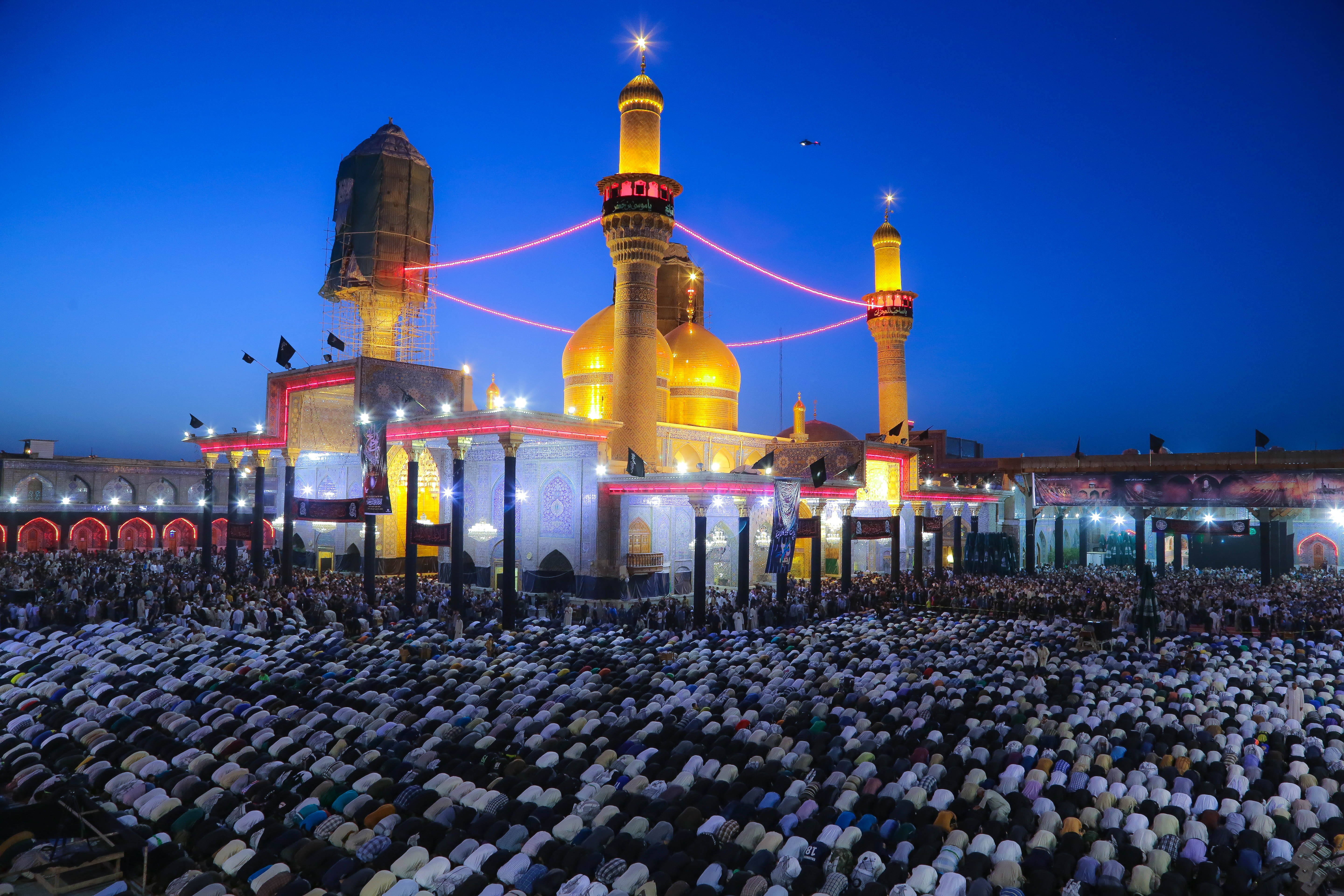 الحضرة الكاظمية هي ضريح الإمام موسى الكاظم وحفيده الإمام محمد الجواد، وتقع في بغداد عاصمة العراق